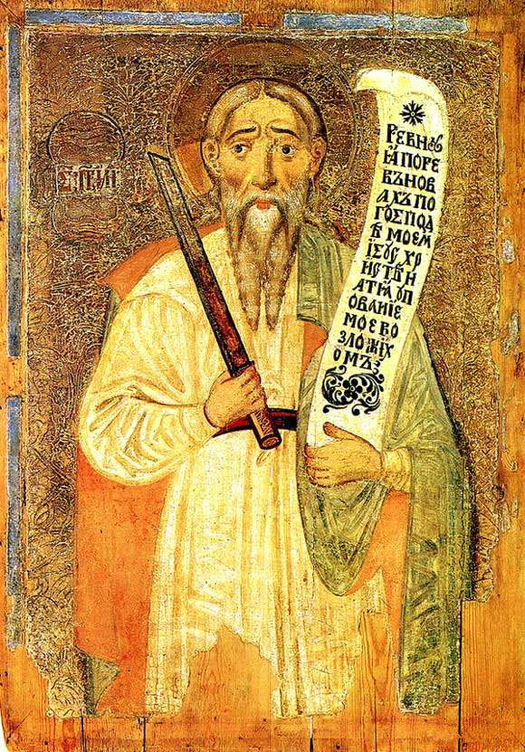 Ілья. 1668. Дошка, яечная тэмпера. 123х87х2,5.